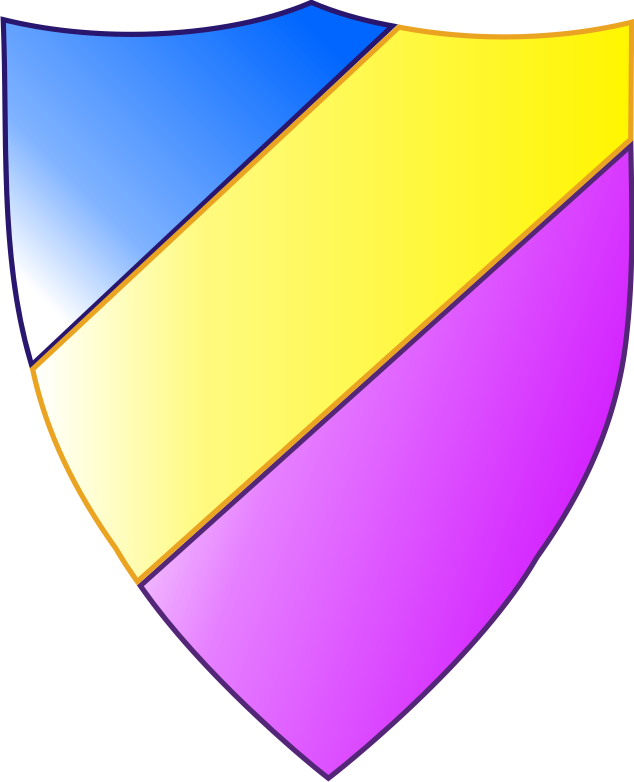 Studenšu korporācijas Varavīksne krāsu vapenis